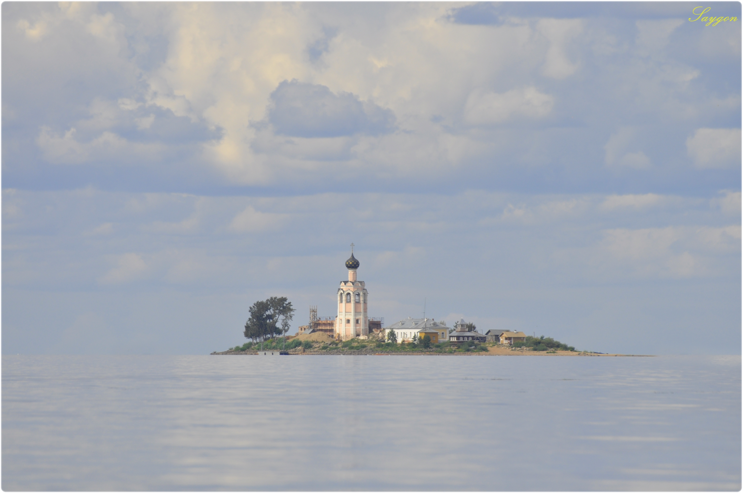 Спасо-Каменный монастырь (колокольня и остатки древних зданий) (Вологодская область, Каменный остров на Кубенском озере).